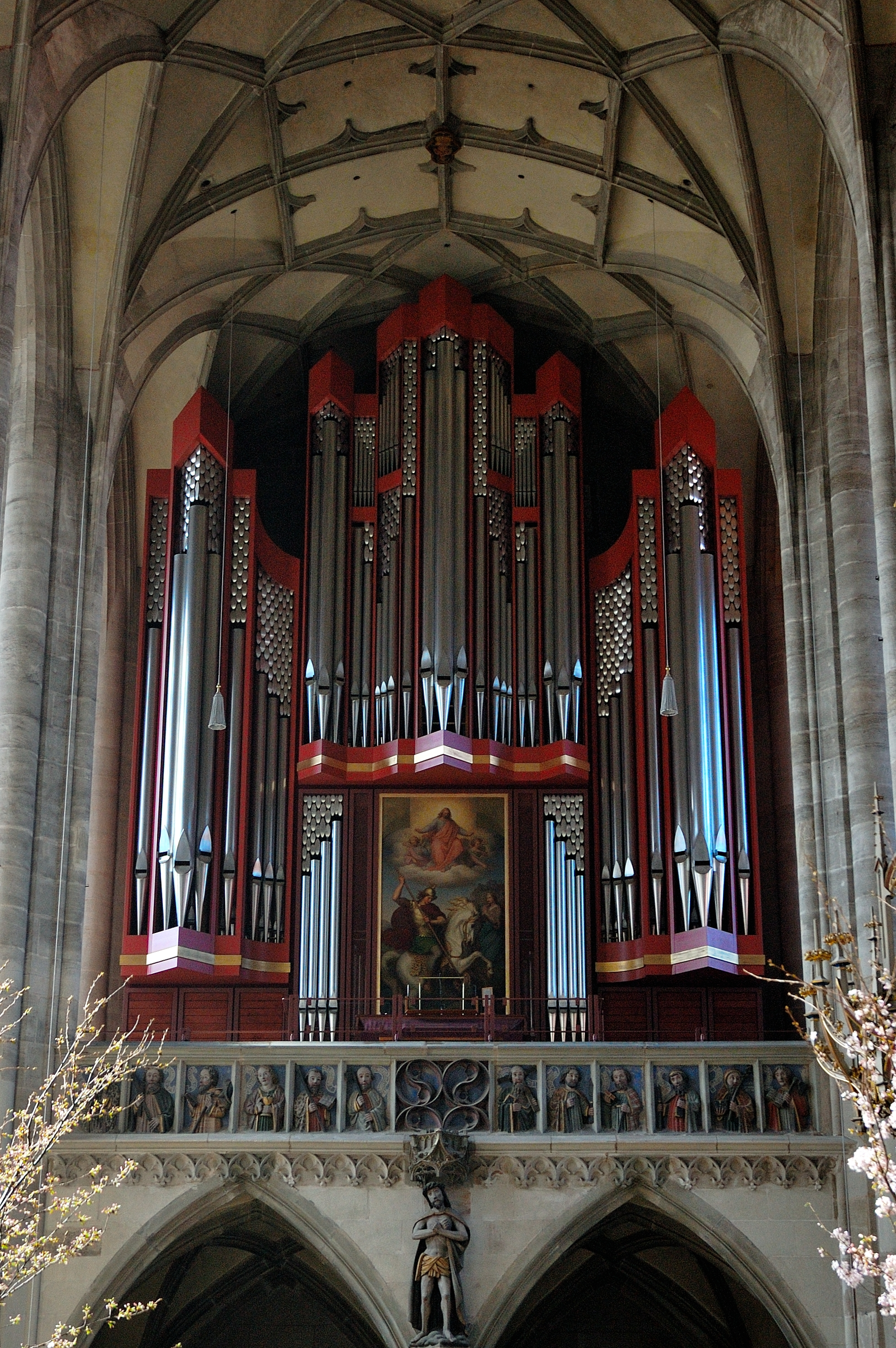 St. Georg Dinkelsbühl, Hauptorgel auf der Westempore